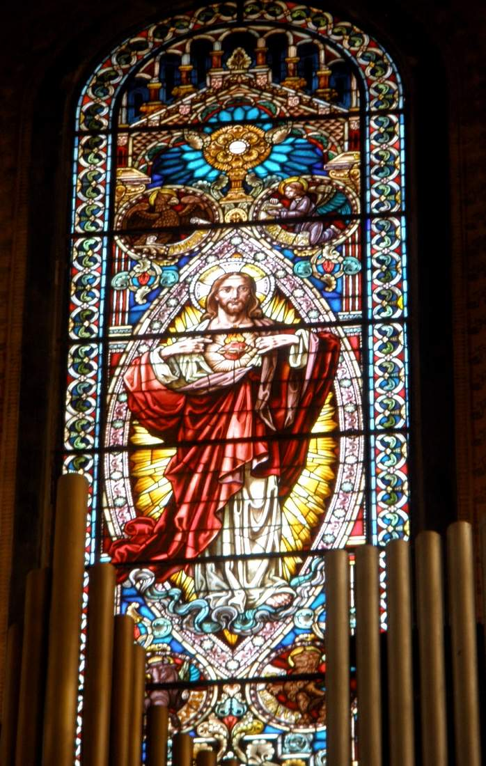 Vidriera de la Basílica del Sagrado Corazón de Jesús, en Gijón (Asturias)